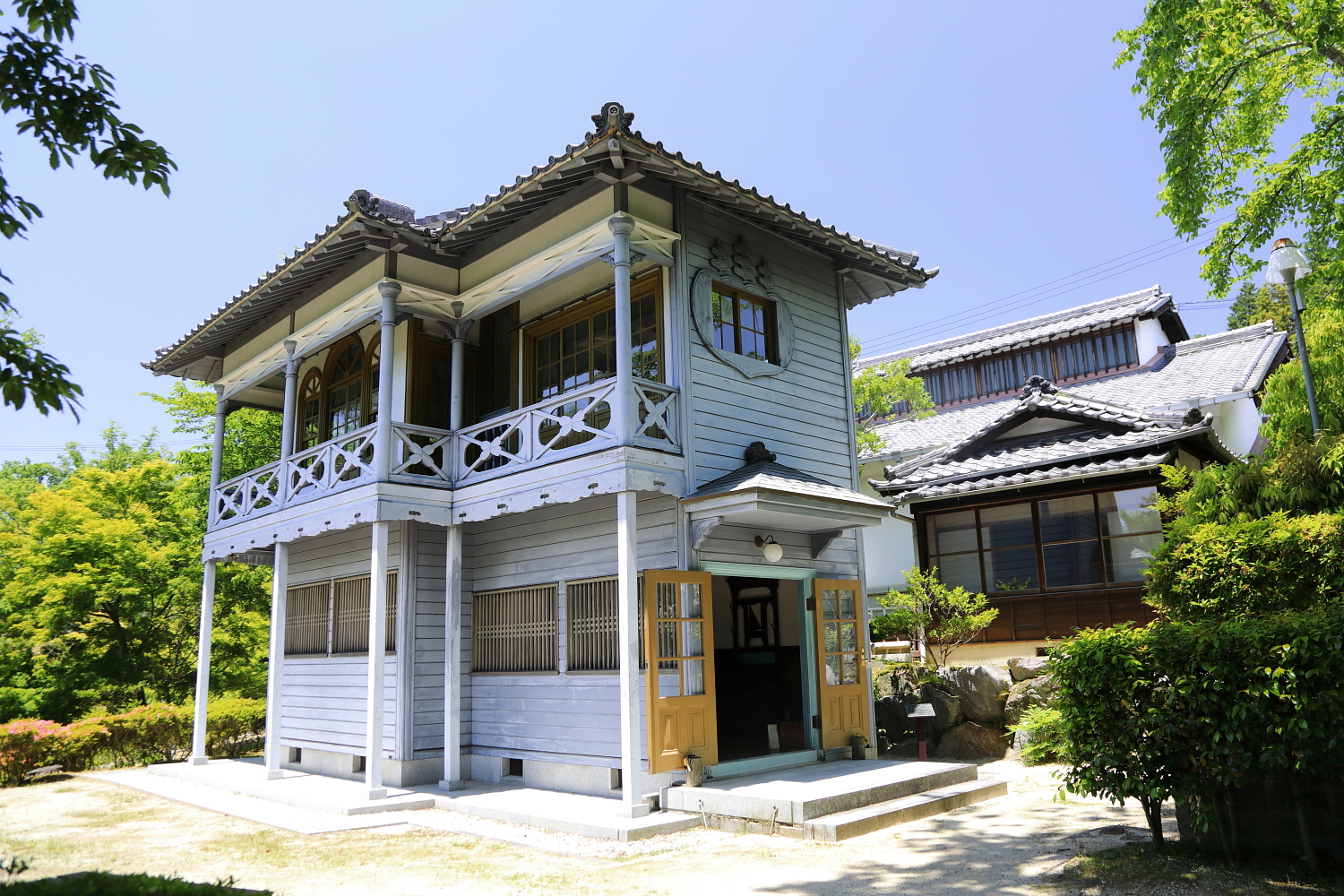 豊田市民芸館 旧井上家西洋館（豊田市平戸橋町、2019年（令和元年）5月）